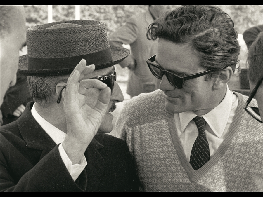 totò e pasolini, © Centro Studi Pier Paolo Pasolini di Casarsa della Delizia.